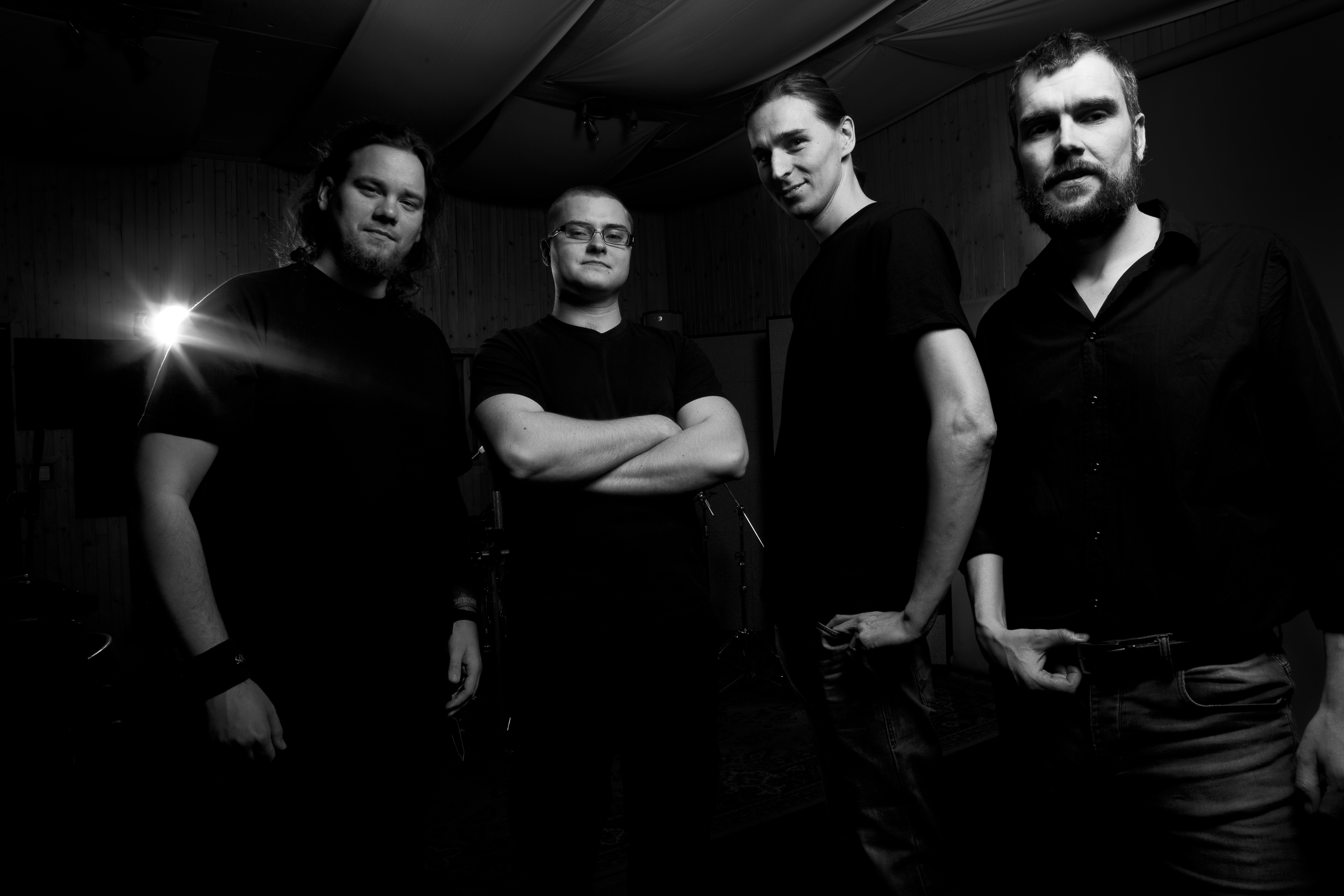 fotosession 2016